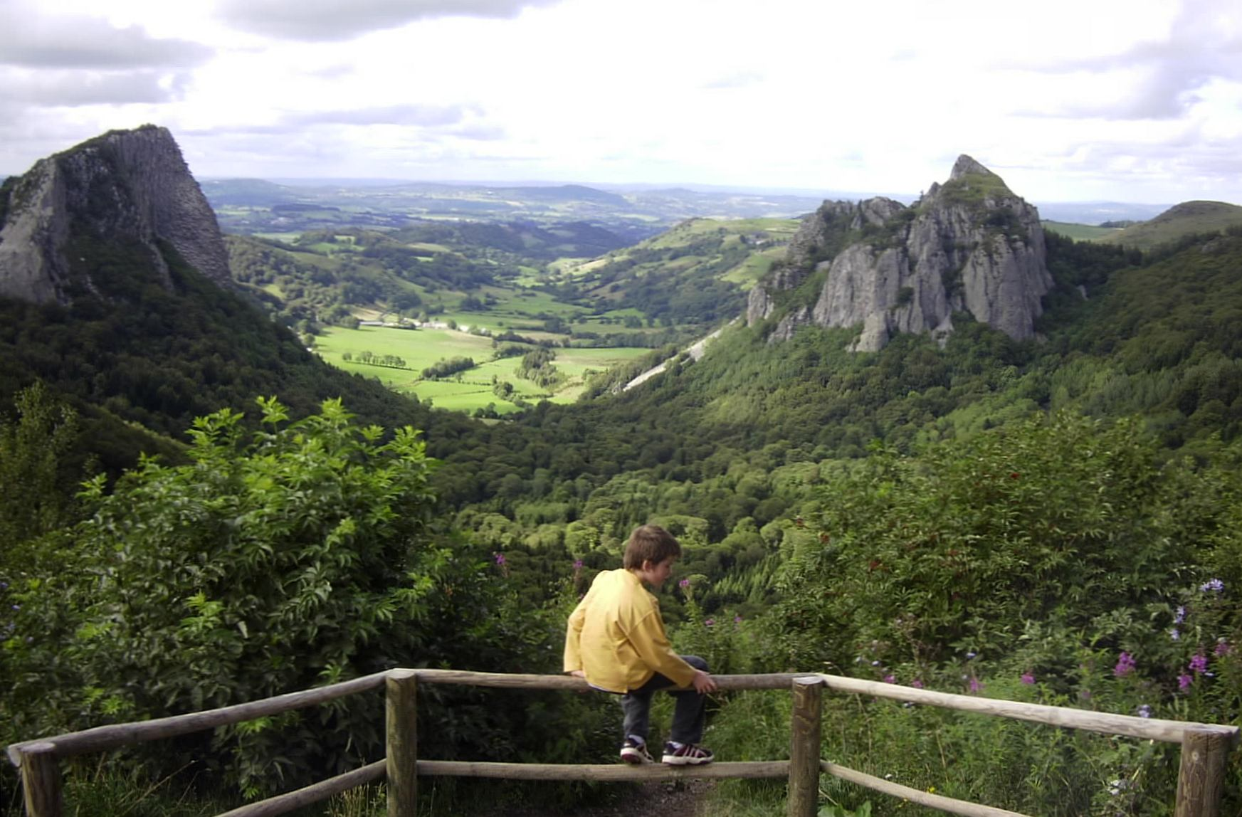 Die Felsen "Tuillère (links) et Sanadoire (rechts)" im Massiv Monts Dore